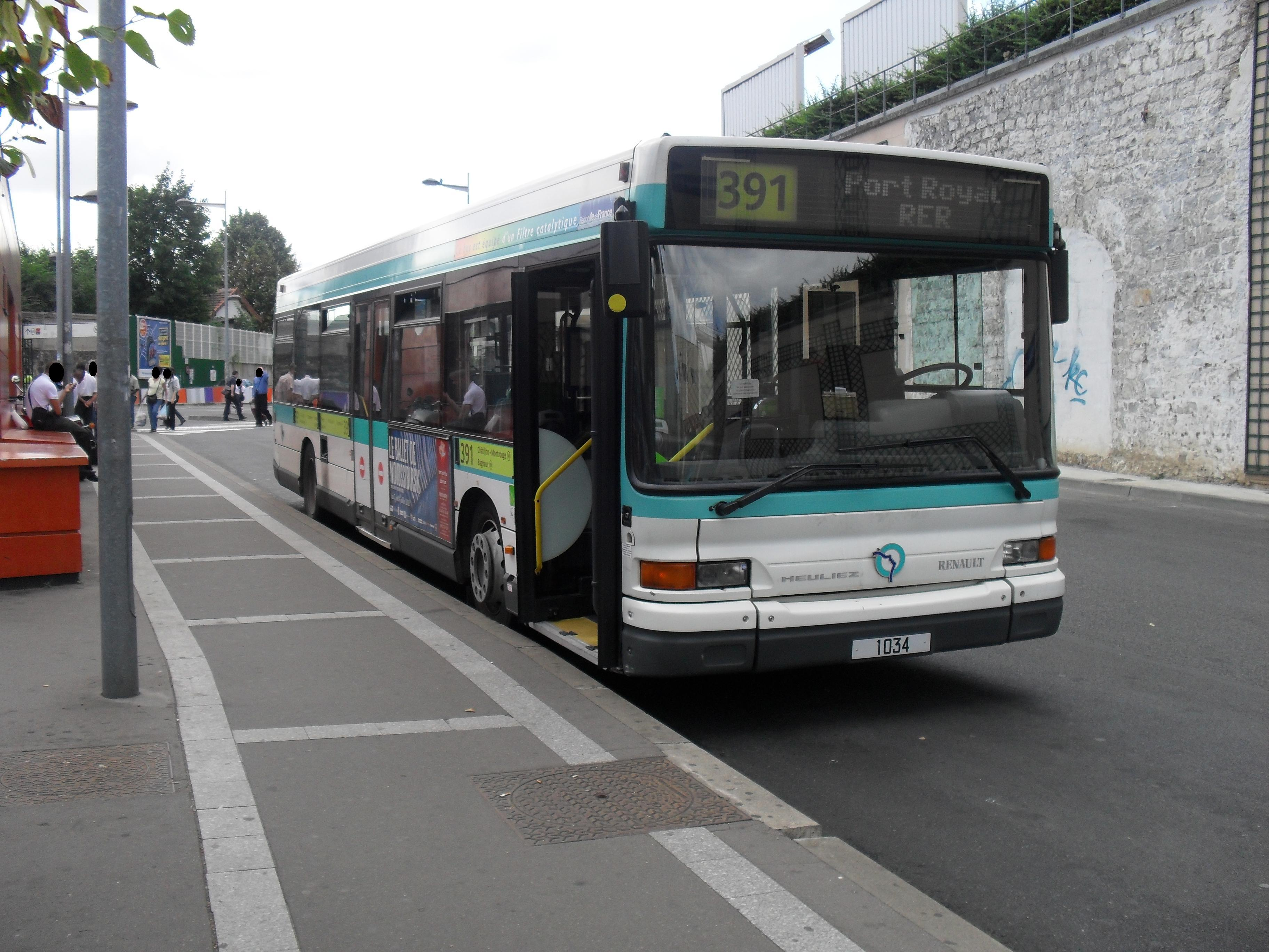 Ligne RATP 391